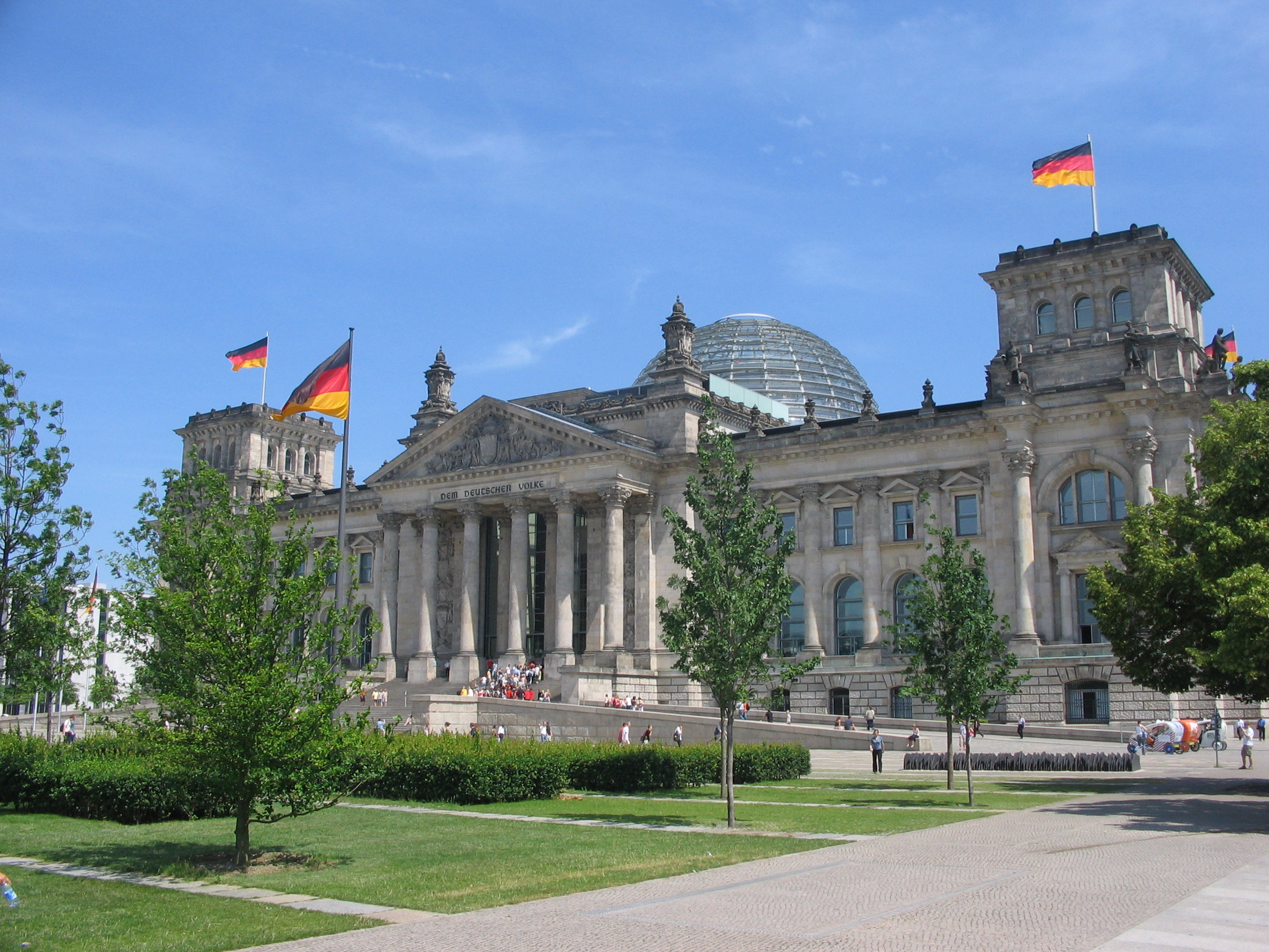 Der Reichstag in Berlin